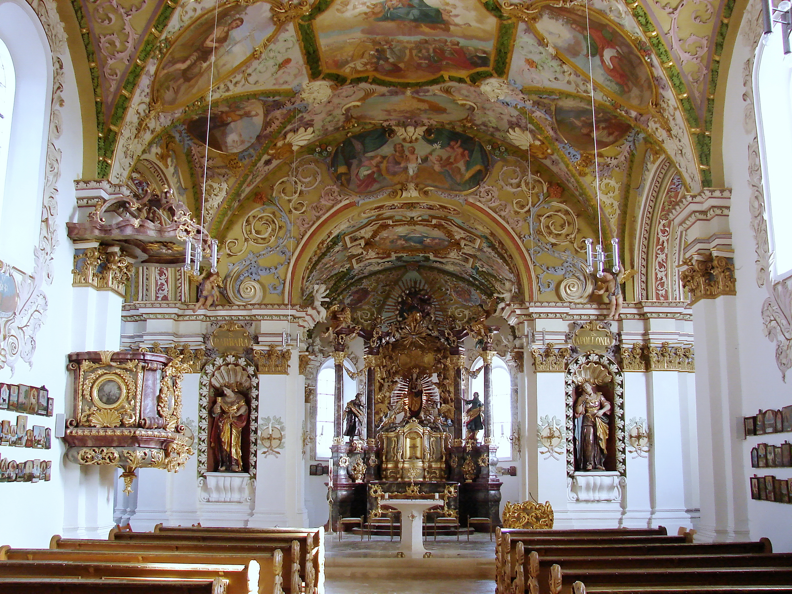 Die Wallfahrtskirche Allersdorf besitzt eine sehr reiche Innenausstattung im Stile des Spätbarock bzw. Rokoko. Allerdings stammt das eigentliche Gnadenbild, eine Holzfigur der Muttergottes mit dem Jesuskind, aus dem frühen 16. Jahrhundert, ist also älter als der heutige Kirchenbau.